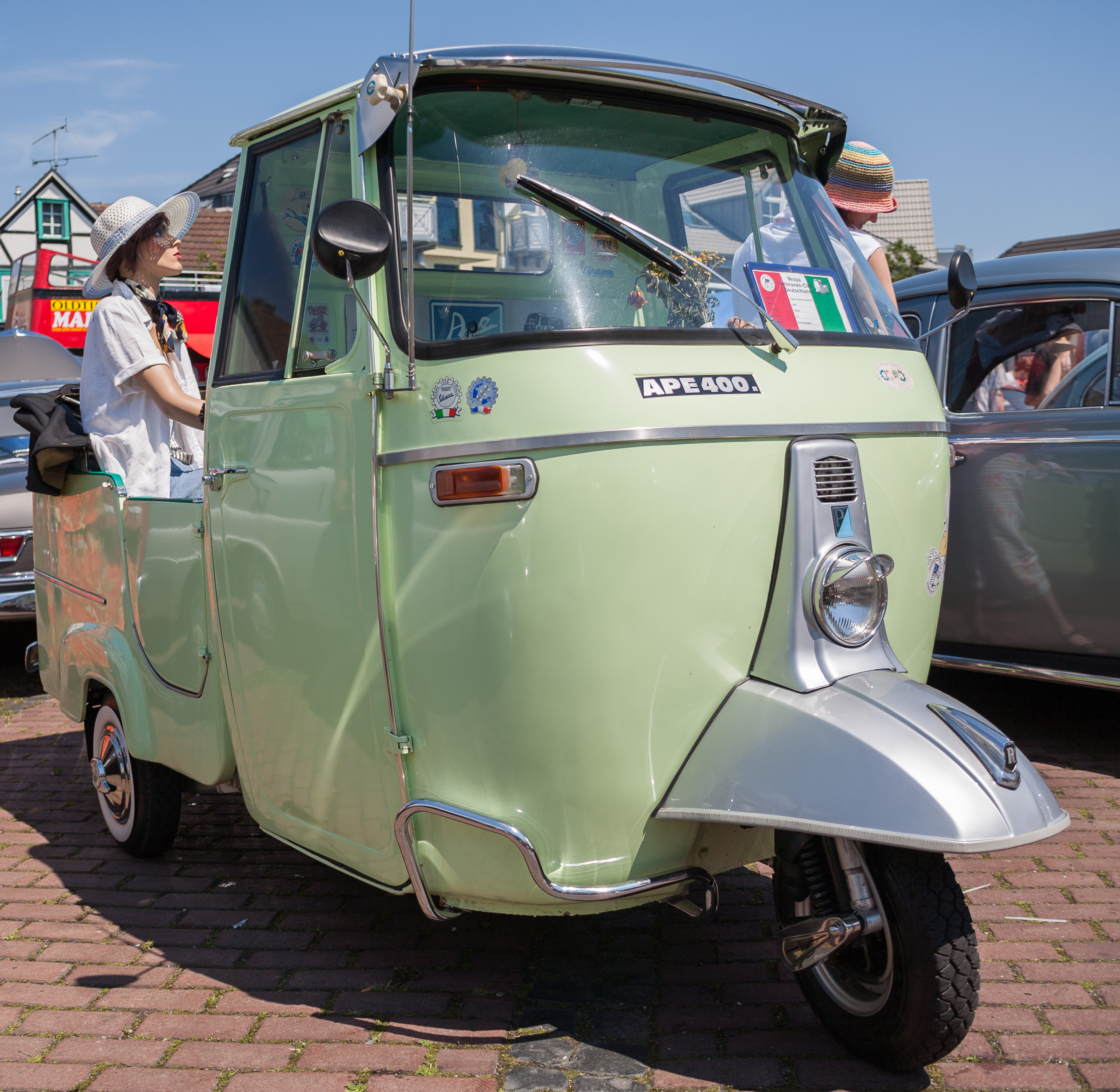 Rheinbach Classics 2007 – Piaggio Ape 400